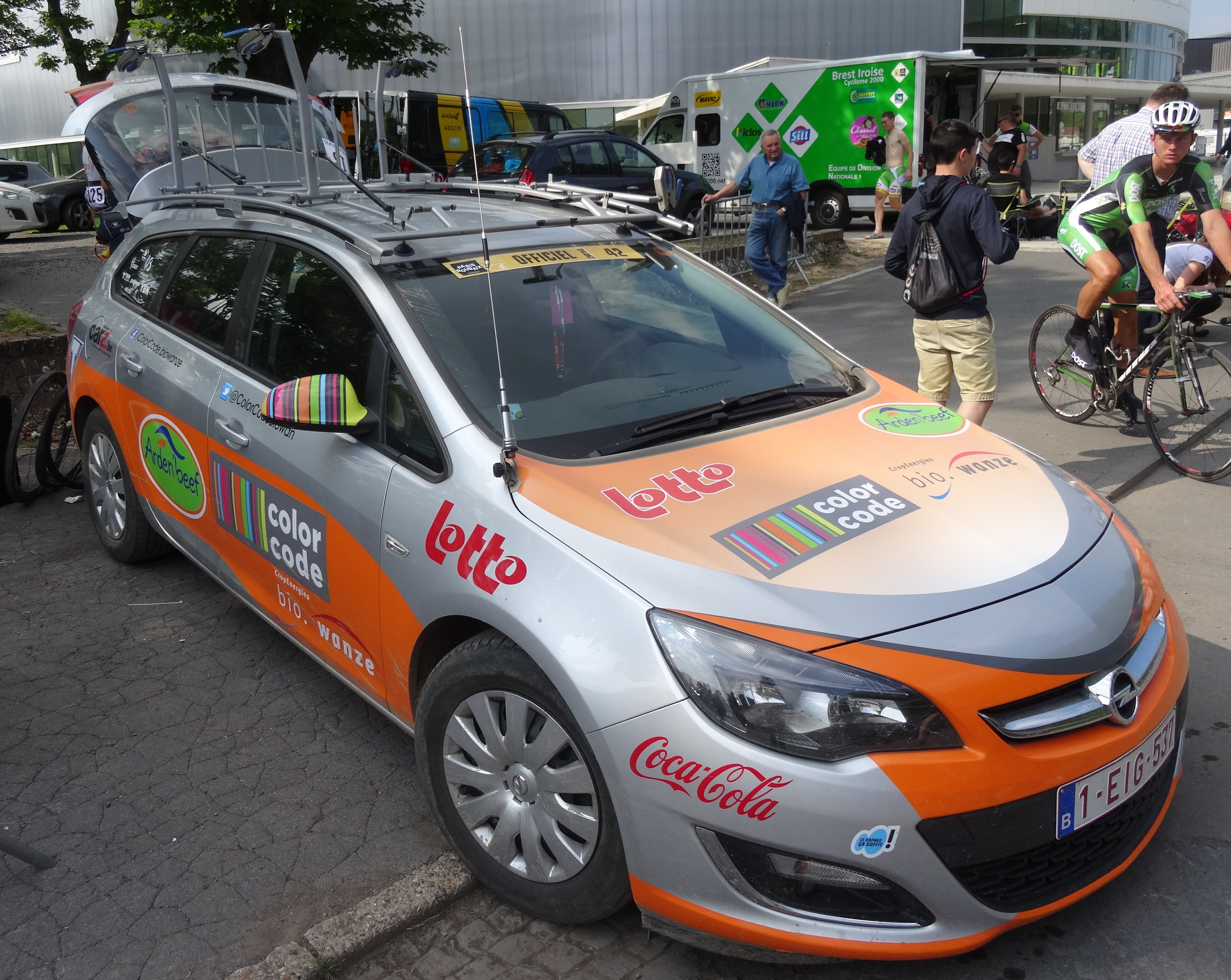 Reportage réalisé le dimanche 1er juin à l'occasion de l'arrivée du Paris-Roubaix espoirs 2014 au vélodrome André-Pétrieux à Roubaix, Nord, Nord-Pas-de-Calais, France.